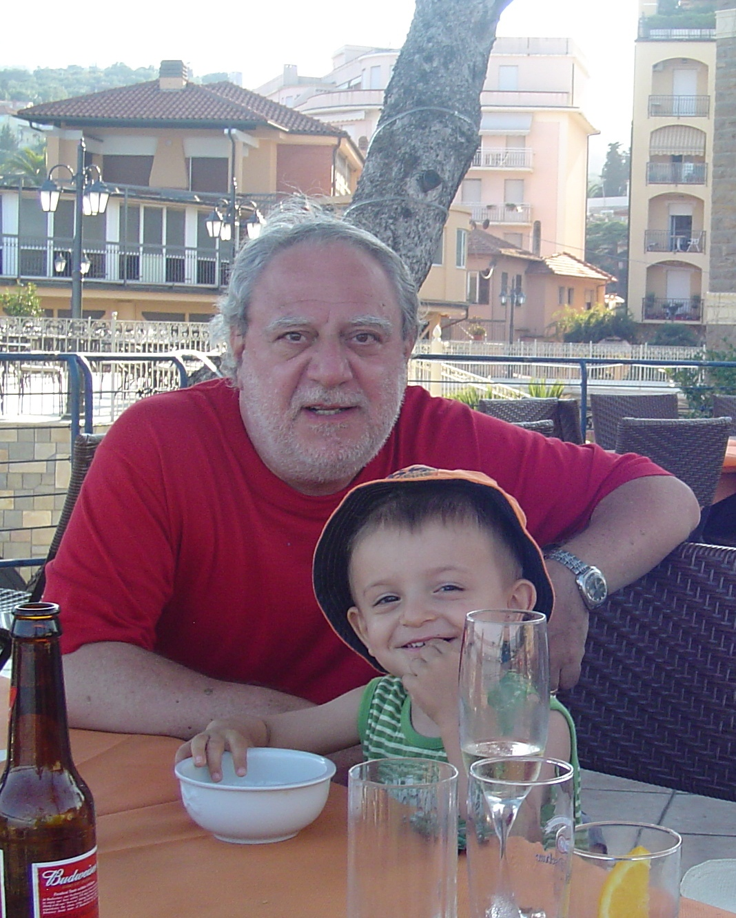 Loris Maria Marchetti